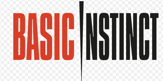 Logo di Basic Instinct